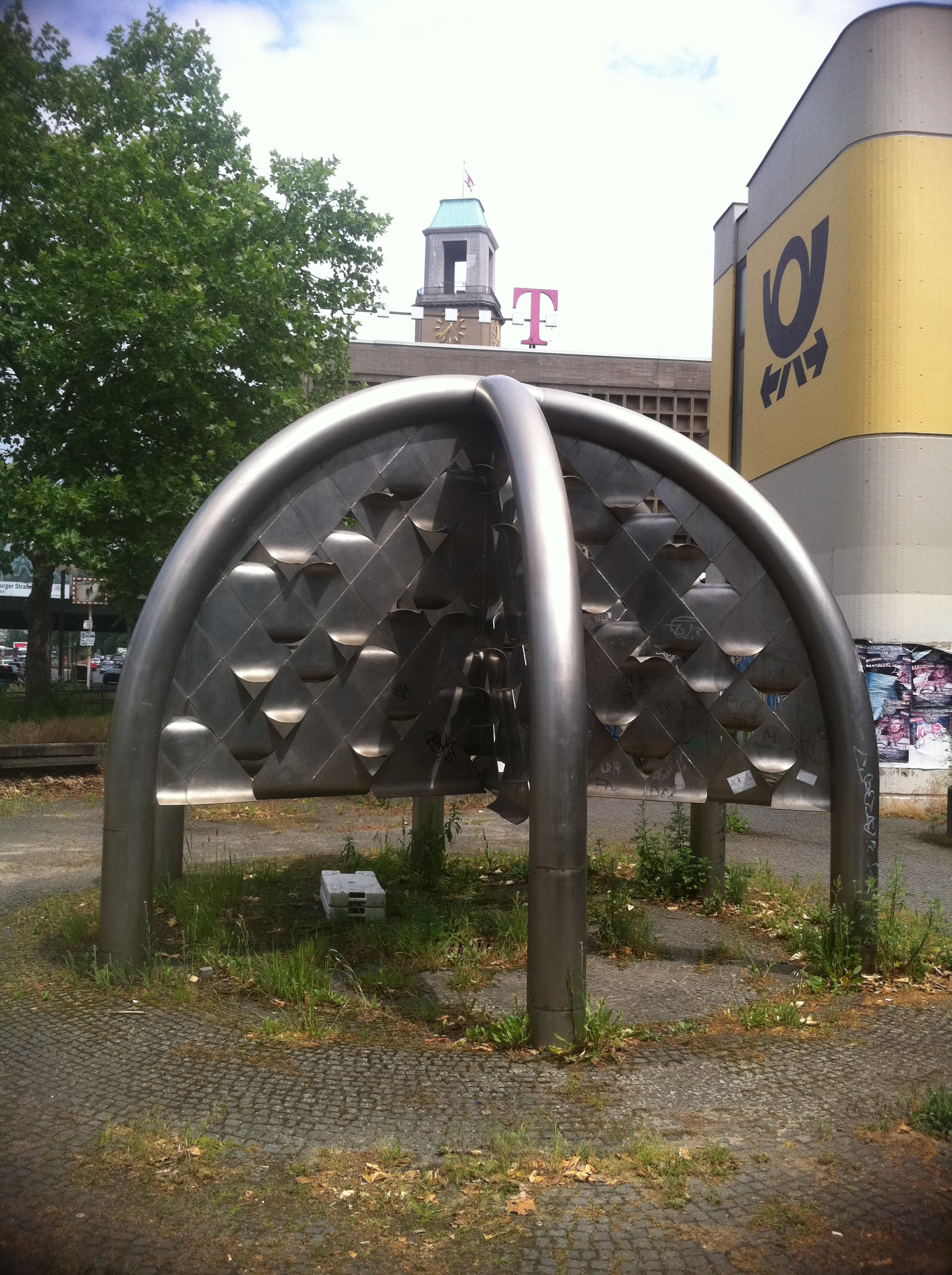 Skulptur Brunnen auf dem Grundstück der ehemaligen Post in Spandau, Klosterstr. 38